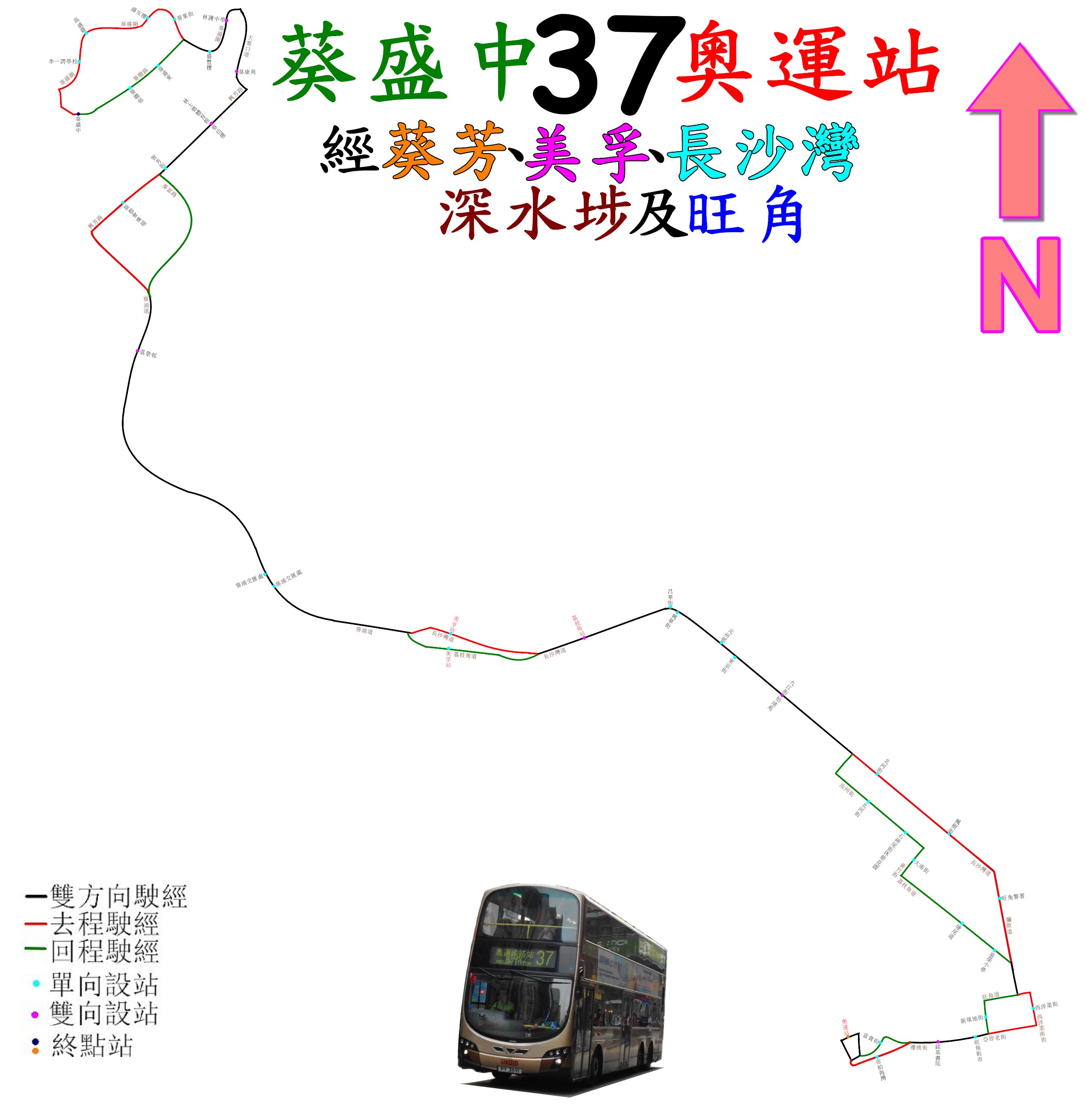 中文（香港）: 九巴37線的走線圖